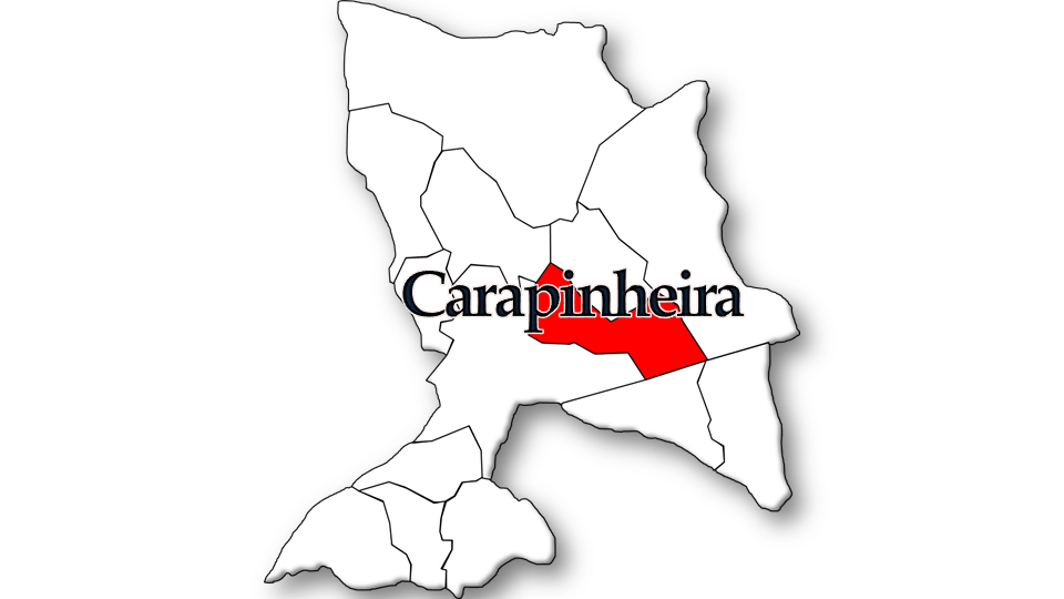 População